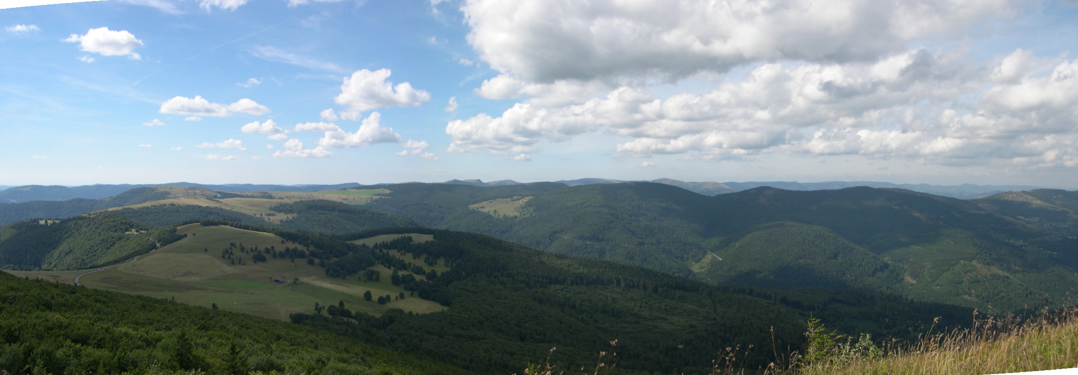 Vue panoramique sur la partie centrale des Vosges depuis le Storkenkopf. Au fond (1/3 droit) le Hohneck 1364 m, formant la limite Haut-Rhin/Vosges, devant le Klintzkopf, 1330m.